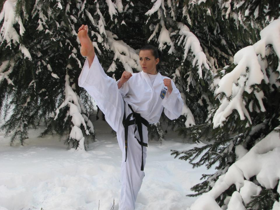 Техниките с крака са "запазена марка" в таекуон-до